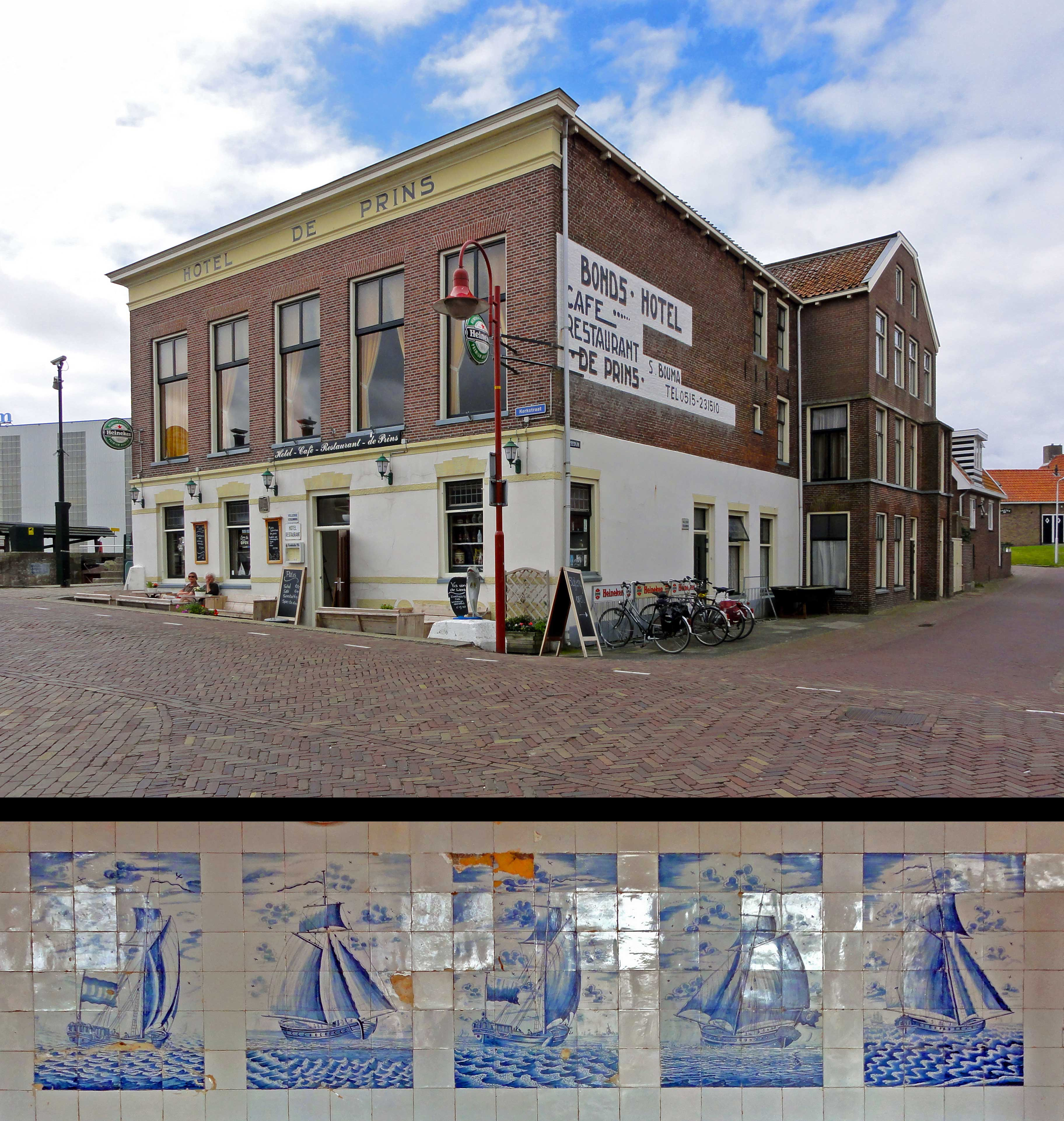 Hotel "De Prins" met een deel van de monumentale tegelwand, Kerkstraat 1 te Makkum